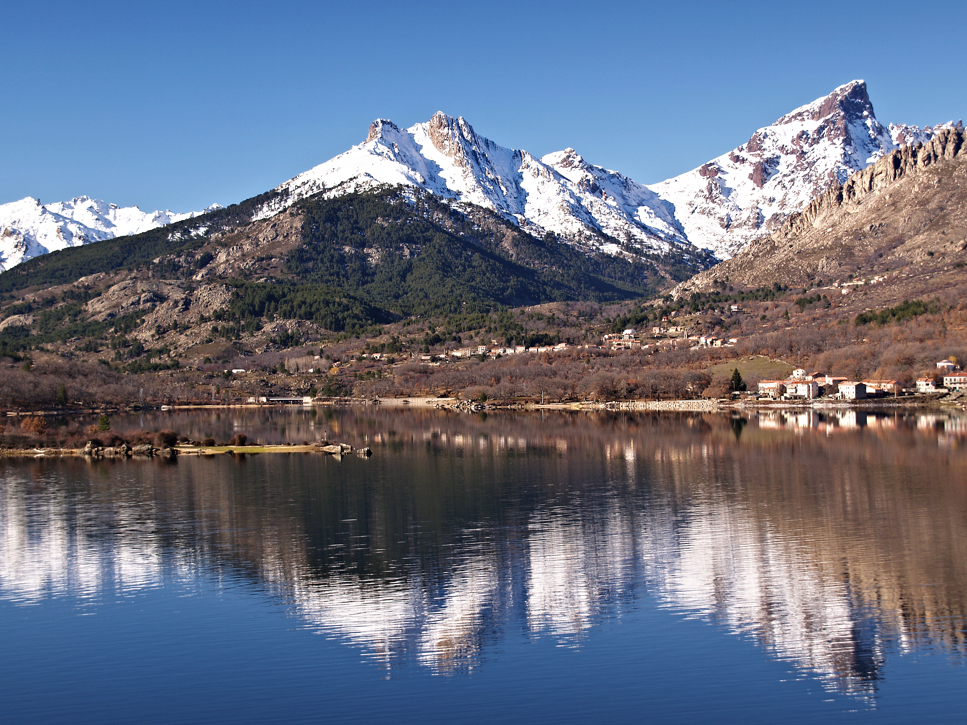 Albertacce village et Paglia Orba